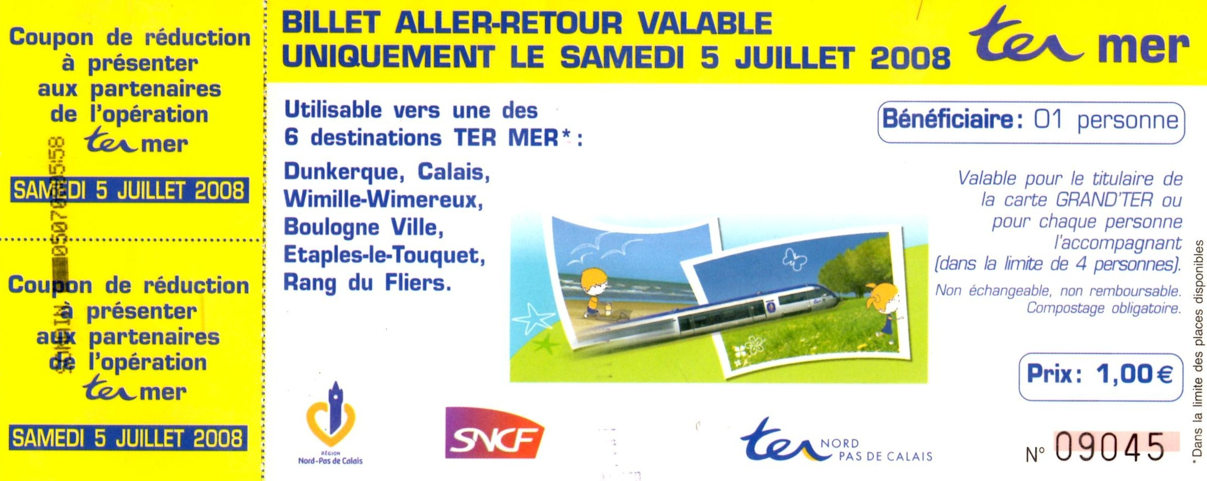 Ticket de train du Nord-Pas-de-Calais : opération TER Mer, le samedi 5 juillet 2008.